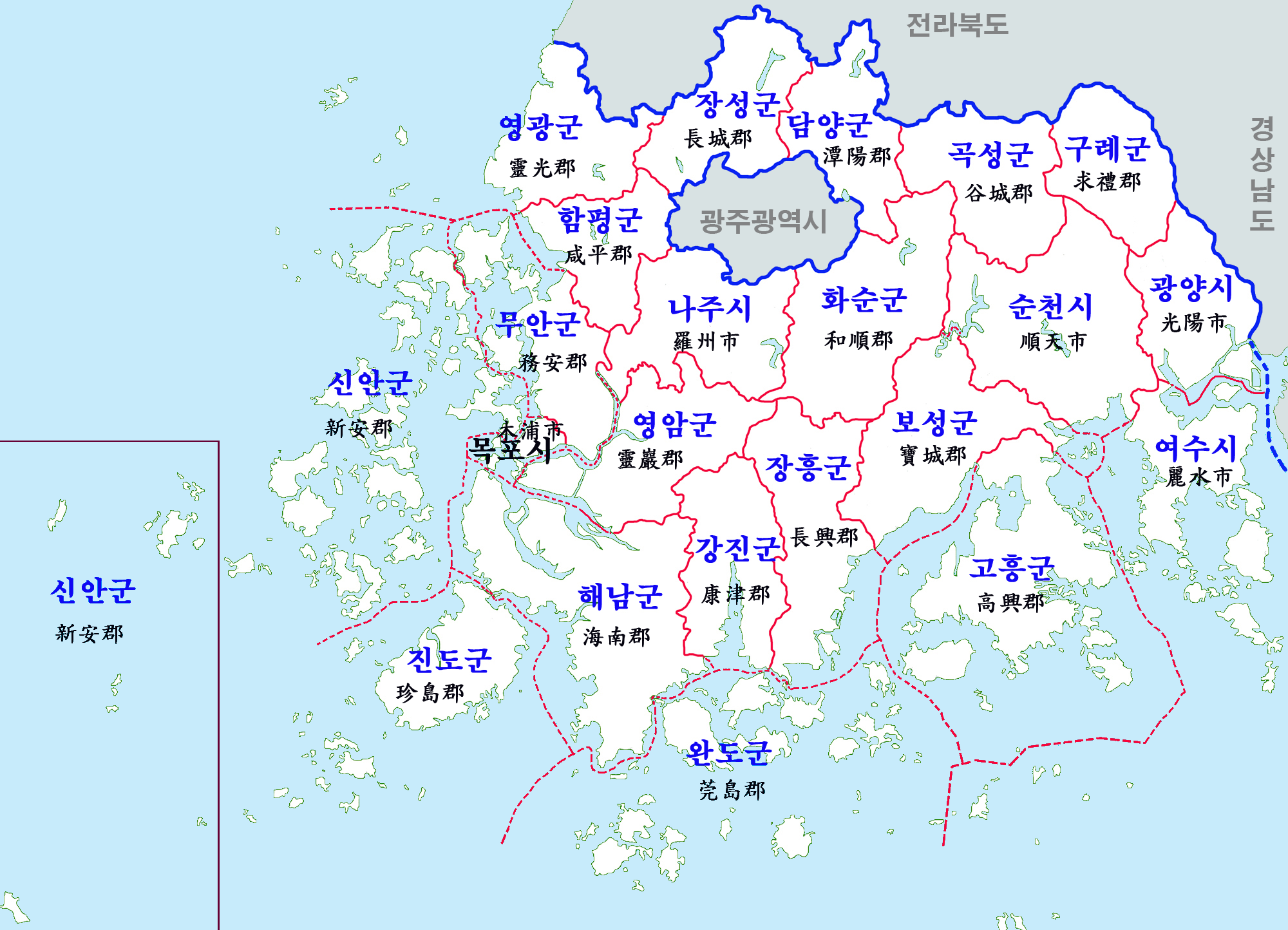 전남행정구역도